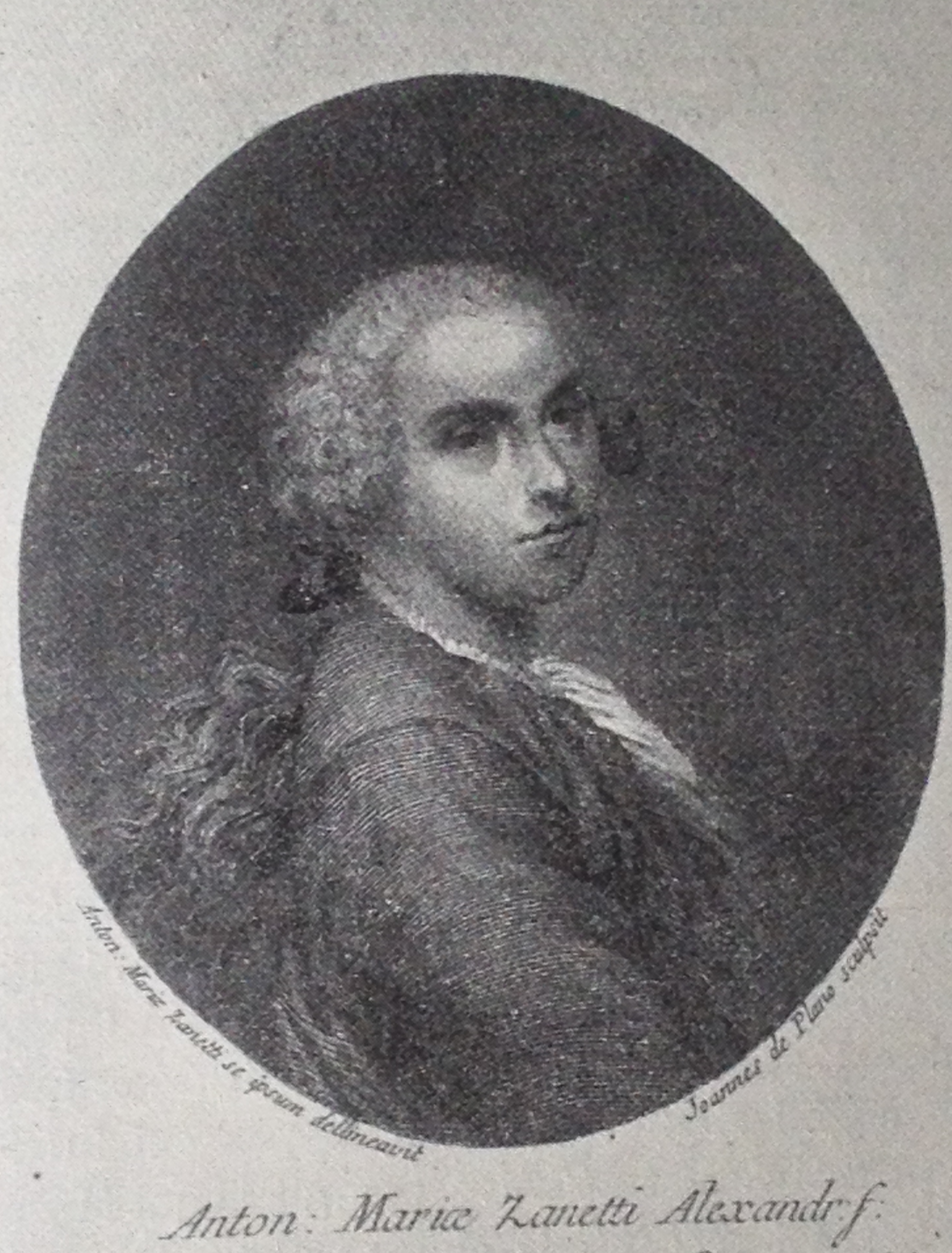 Riproduzione dell'autoritratto della lapide funeraria di A.M. Zanetti il Giovane (1706-1778) sepolto a Venezia nella chiesa di Santa Maria Mater Domini